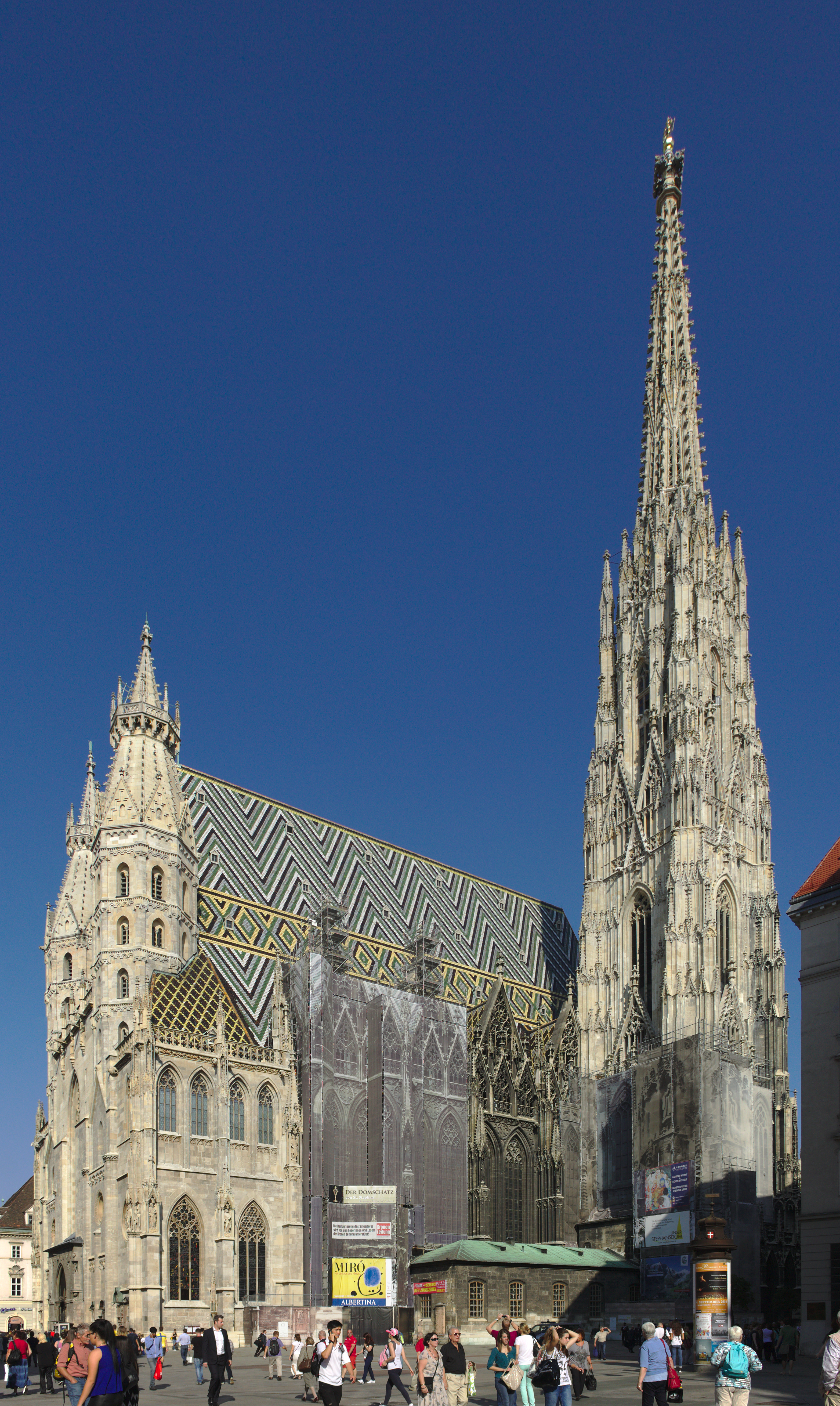 Stephansdom, Dom- und Metropolitankirche St. Stephan